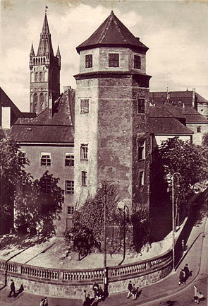 Der Haberturm in Königsberg